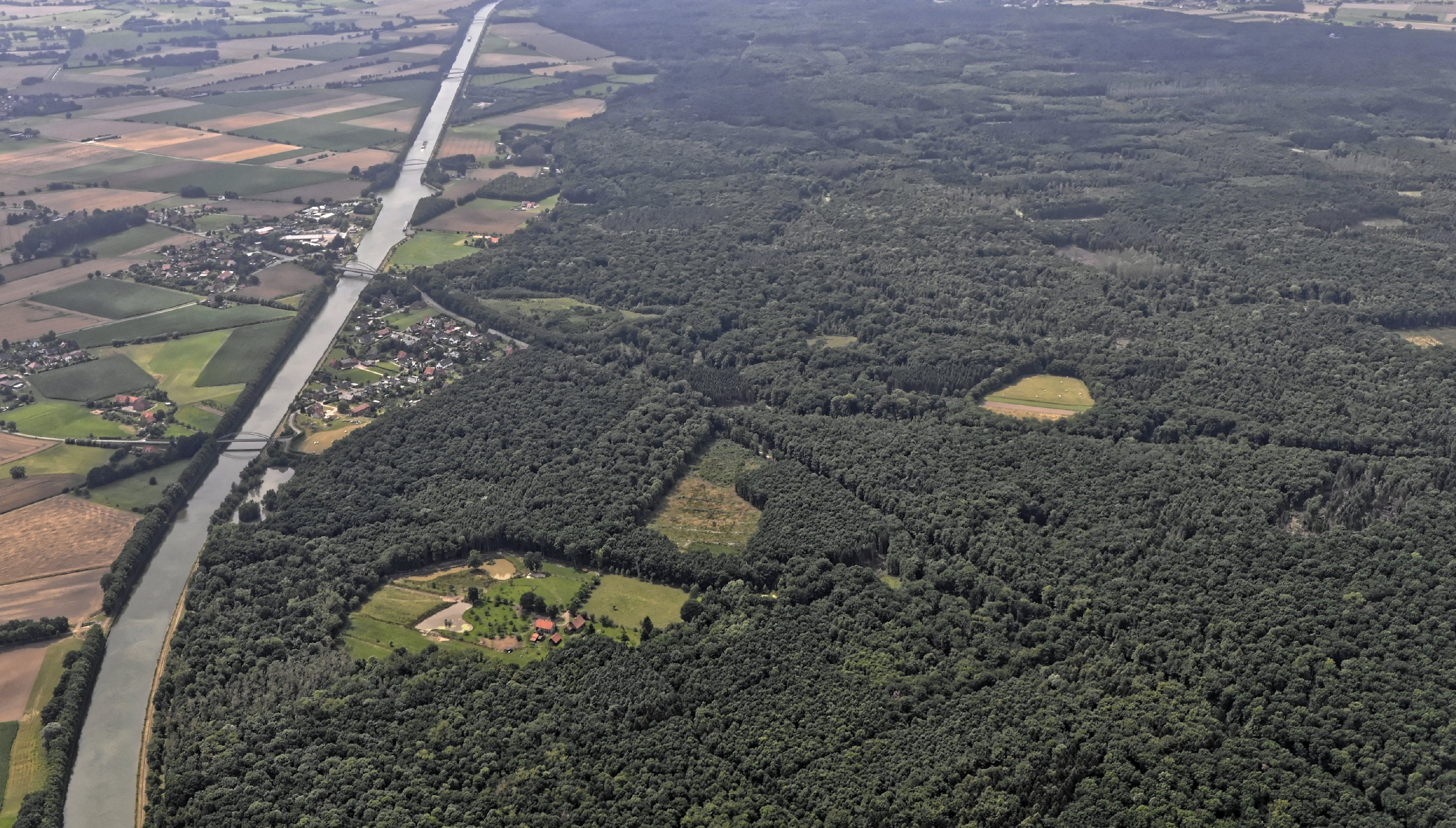 Bilder vom Flug Nordholz-Hammelburg 2015: Blick von Nordosten auf das Gehöft Vehler Horst (Bildmitte vorn) und Rusbend (links) am Mittellandkanal. Rusbend ist ein Stadtteil von Bückeburg im niedersächsischen Landkreis Schaumburg.